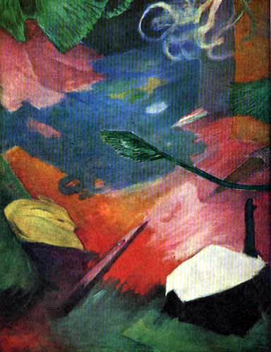 Reh im Walde I, Öl auf Leinwand, 129,5 x 100,5 cm, Privatbesitz